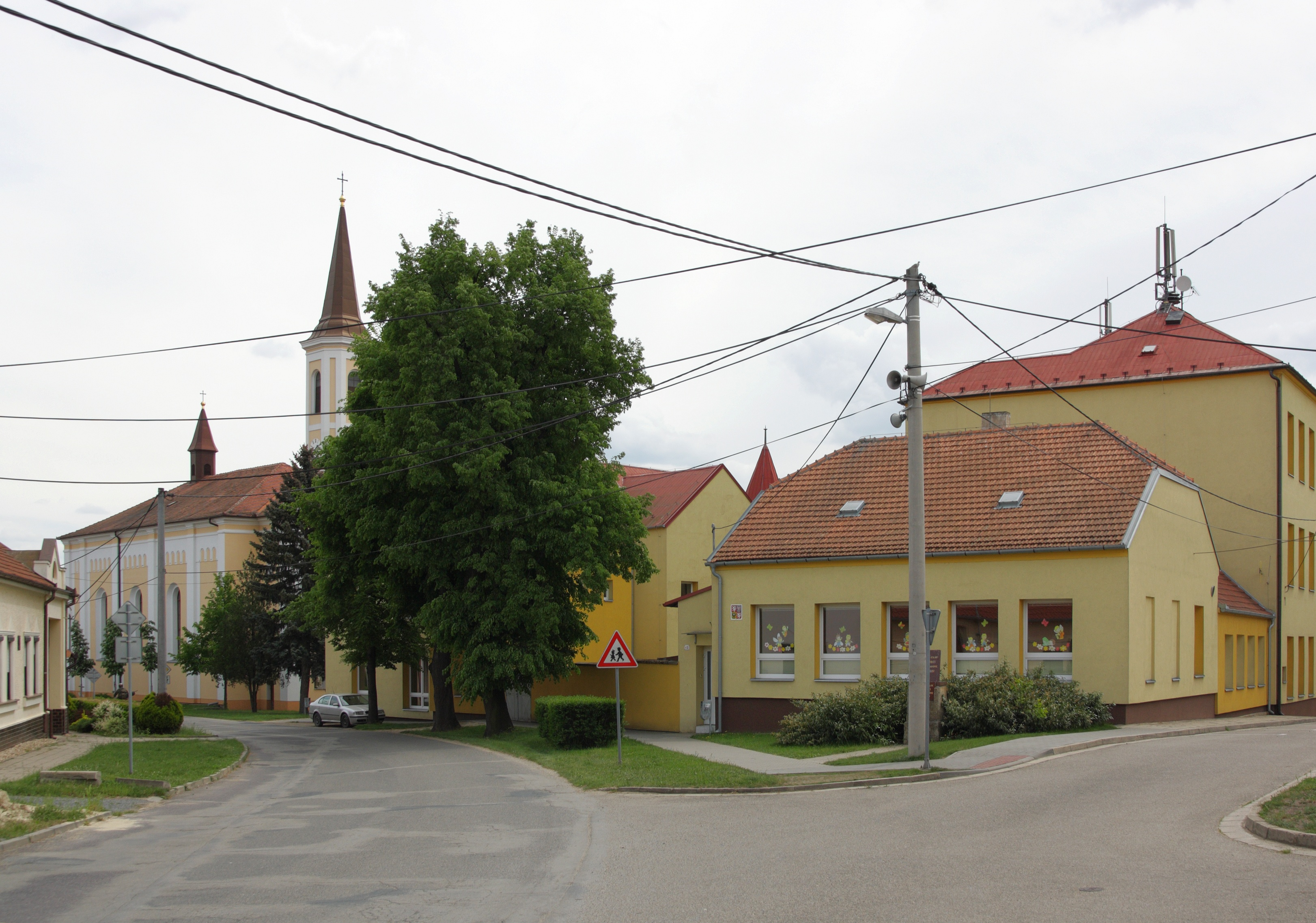 Vranovice (BV) - náves.